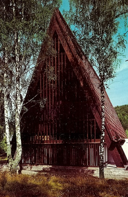 Brumunddal kirke